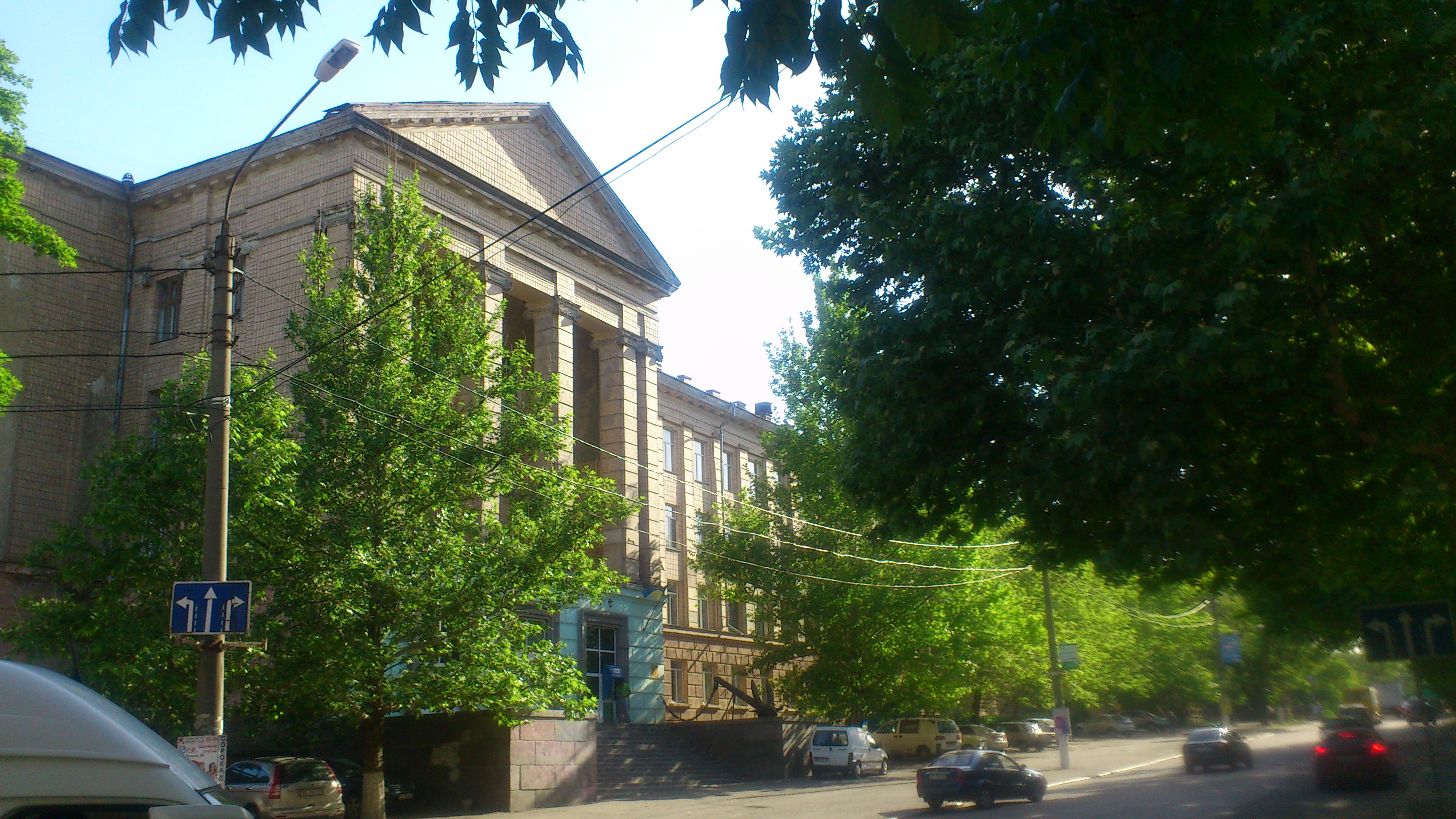 Миколаївський політехнічний інститут і коледж